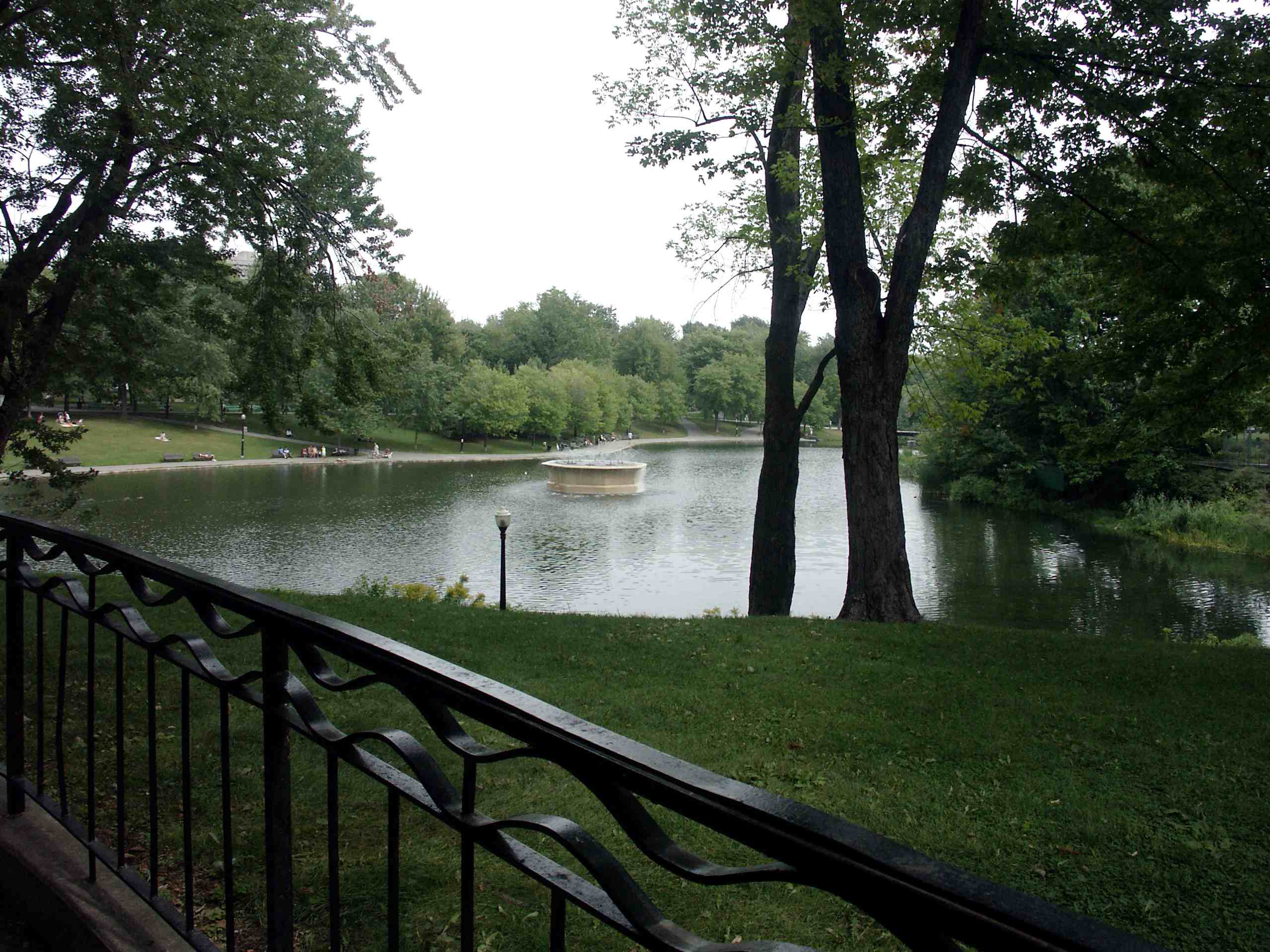 Le parc Lafontaine à Montréal. Vue du nord sur la fontaine au centre de l'étang, un jour plutôt nuageux, août 2005. Photo par User:Gene.arboit.